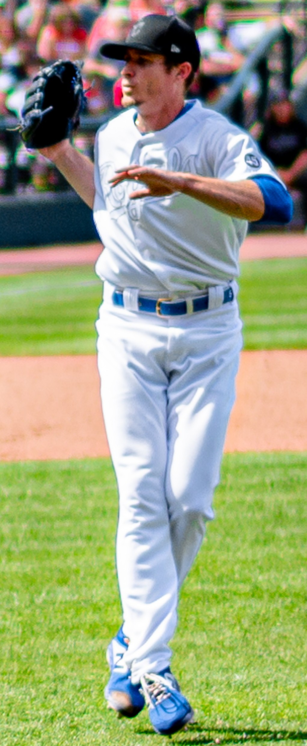 Kansas City Royals VS. Cleveland Indians